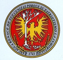 Escudo de la ciudad de Rancagua. Descripción: Escudo orlado con dos ramas de laurel y en su centro un fénix, renaciendo de sus cenizas y sosteniendo en su garra derecha el Árbol de la Libertad. El campo del escudo será rojo y el lema que circuirá el fénix será el siguiente: "Rancagua renace de sus cenizas, porque su patriotismo la inmortalizó".